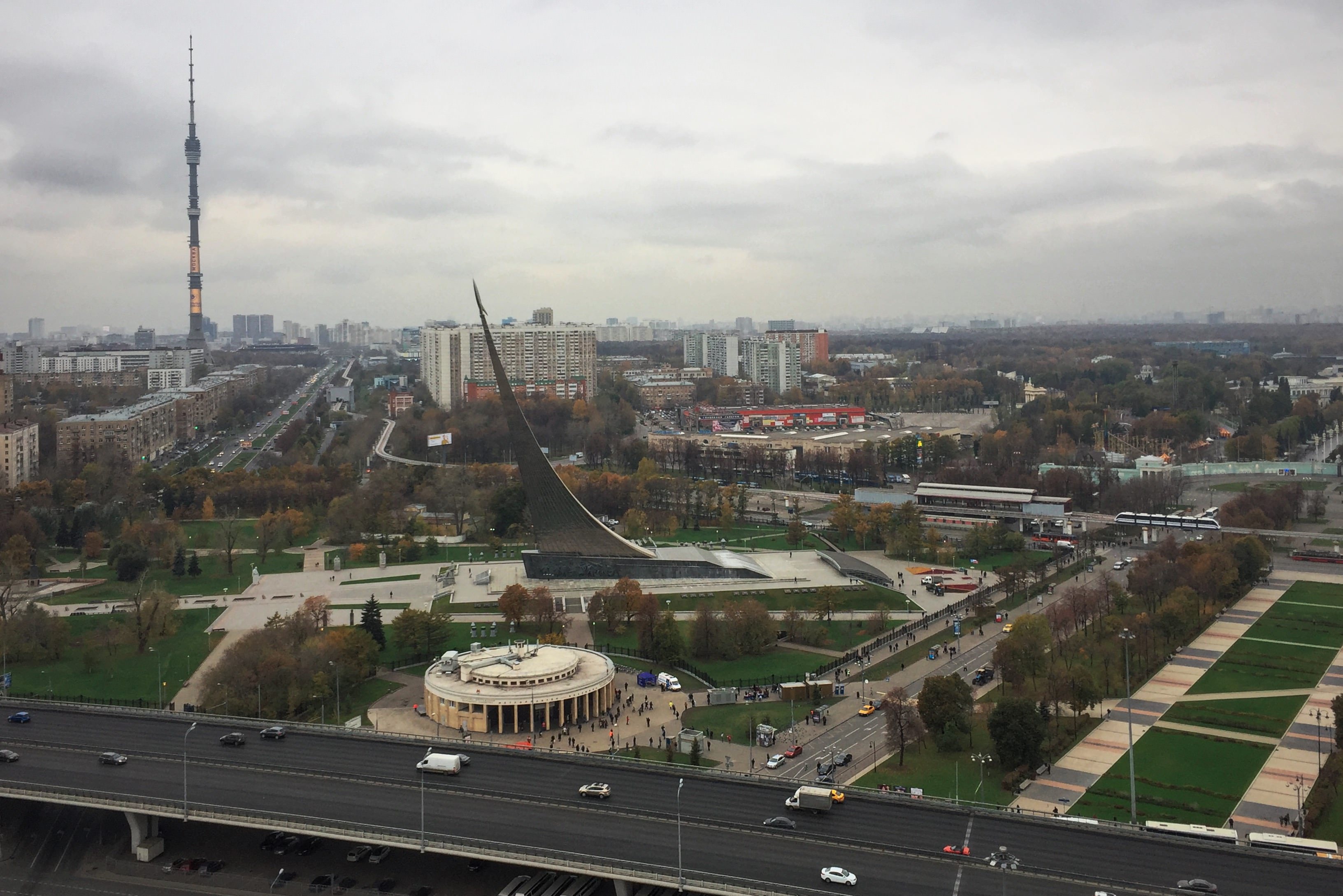 Проспект Мира. Вид из гостиницы «Космос»